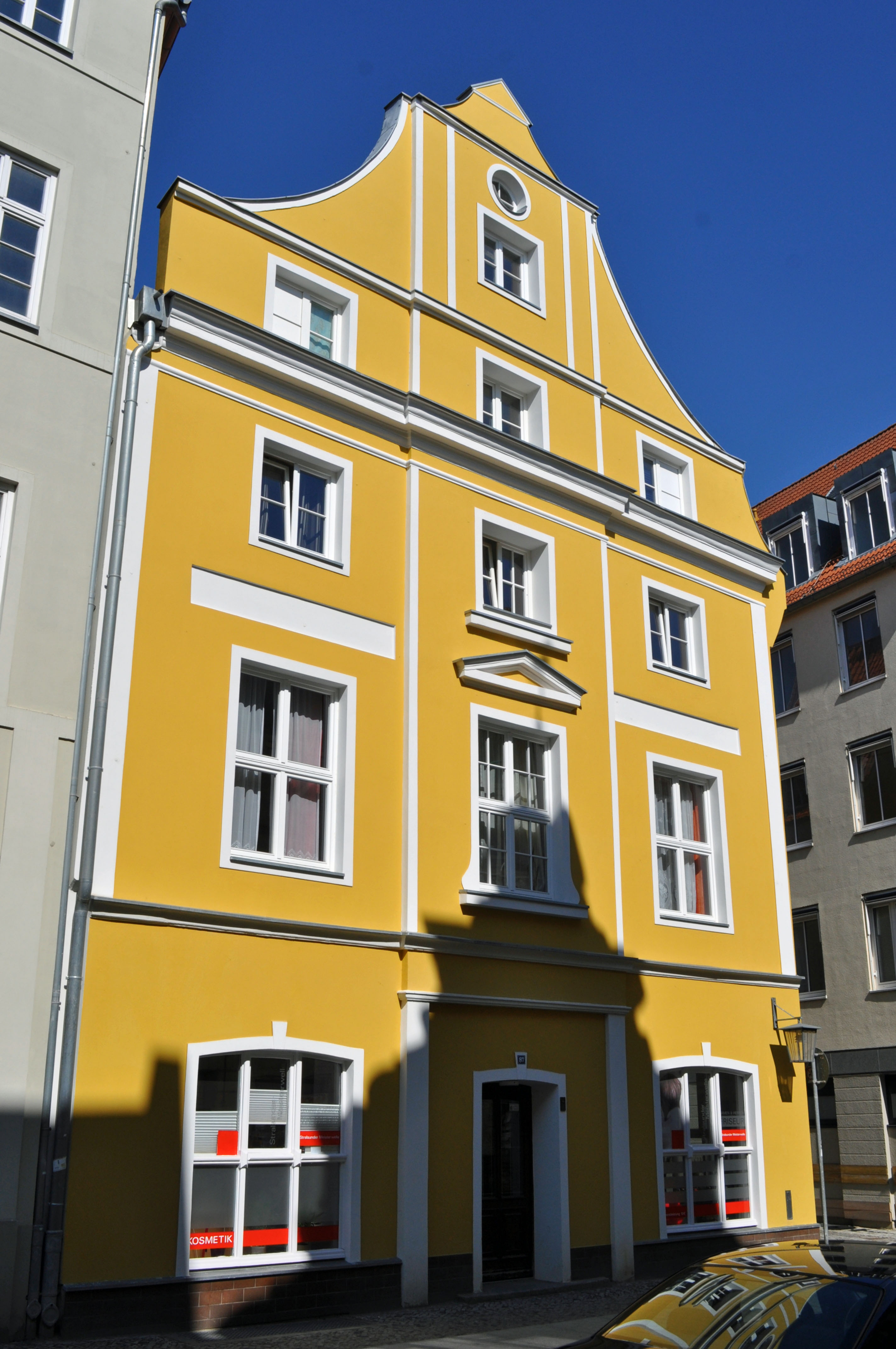 Gebäude bzw. Gebäudedetail in Stralsund. Straße und Hausnummer siehe Dateiname.